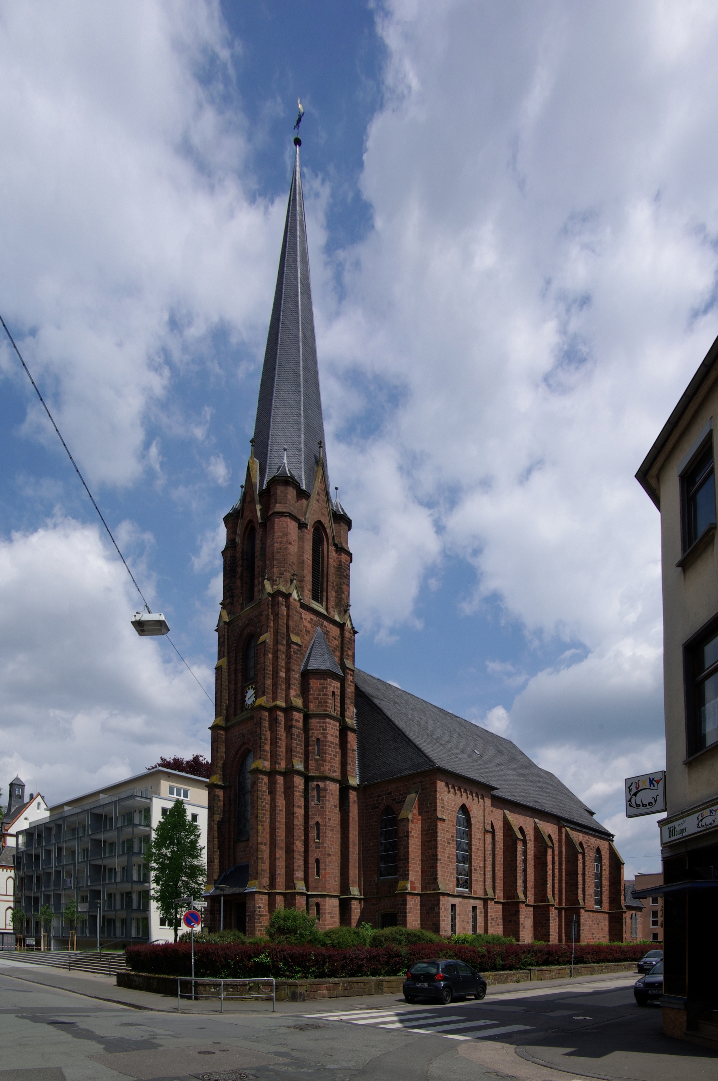 Trier,Friedrich-Wilhelm-Straße 33: Katholische Pfarrkirche Herz Jesu; neugotische dreischiffige Hallenkirche, Rotsandsteinquaderbau, 1893–95, Architekt Dombaumeister Reinhold Wirtz, nach Kriegszerstörung vereinfacht wiederhergestellt 1950, Architekt F. Thoma, Neugestaltung des Innenraums 1989–93, Architekt Peter von Stipelen.